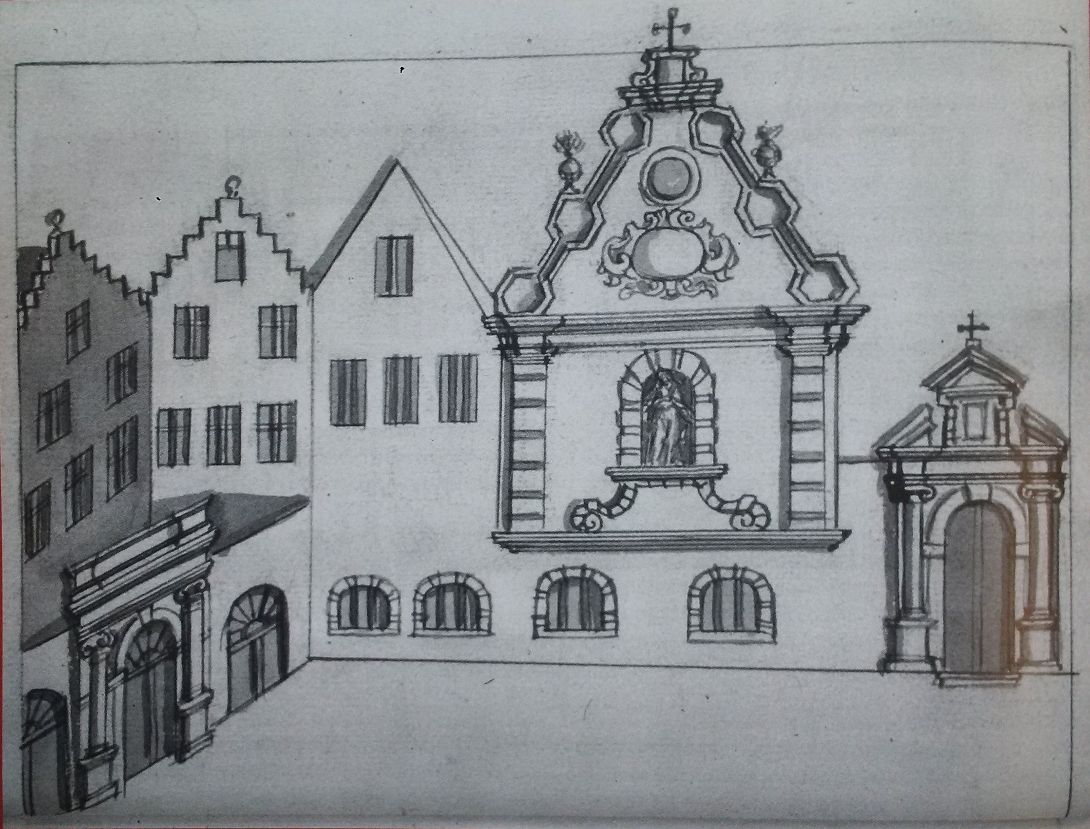 In 1662 kopen de Engelse franciscanessen het hoofdgebouw van het verlaten Prinsenhof in Brugge van de toenmalige eigenaar Rogier de Ghelder. Onmiddellijk werd gestart met de herstellings- en aanpassingswerken van de vervallen gebouwen. Daarvoor konden de zusters rekenen op de steun van twee belangrijke weldoeners: Henri Howard, hertog van Norfolk, en zijn vriend nl. De laatste woonde ook in het Prinsenhof. Zijn huis werd beschreven als een schoon en magnifijcq juijs met twee stenen gevels en een grote poort en is vermoedelijk naast het Klooster afgebeeld op de tekening van Charles Custis.